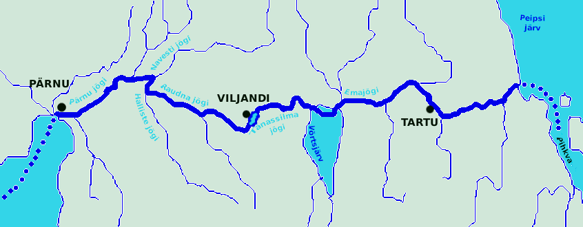 Pärnu-Viljandi-Tartu veetee